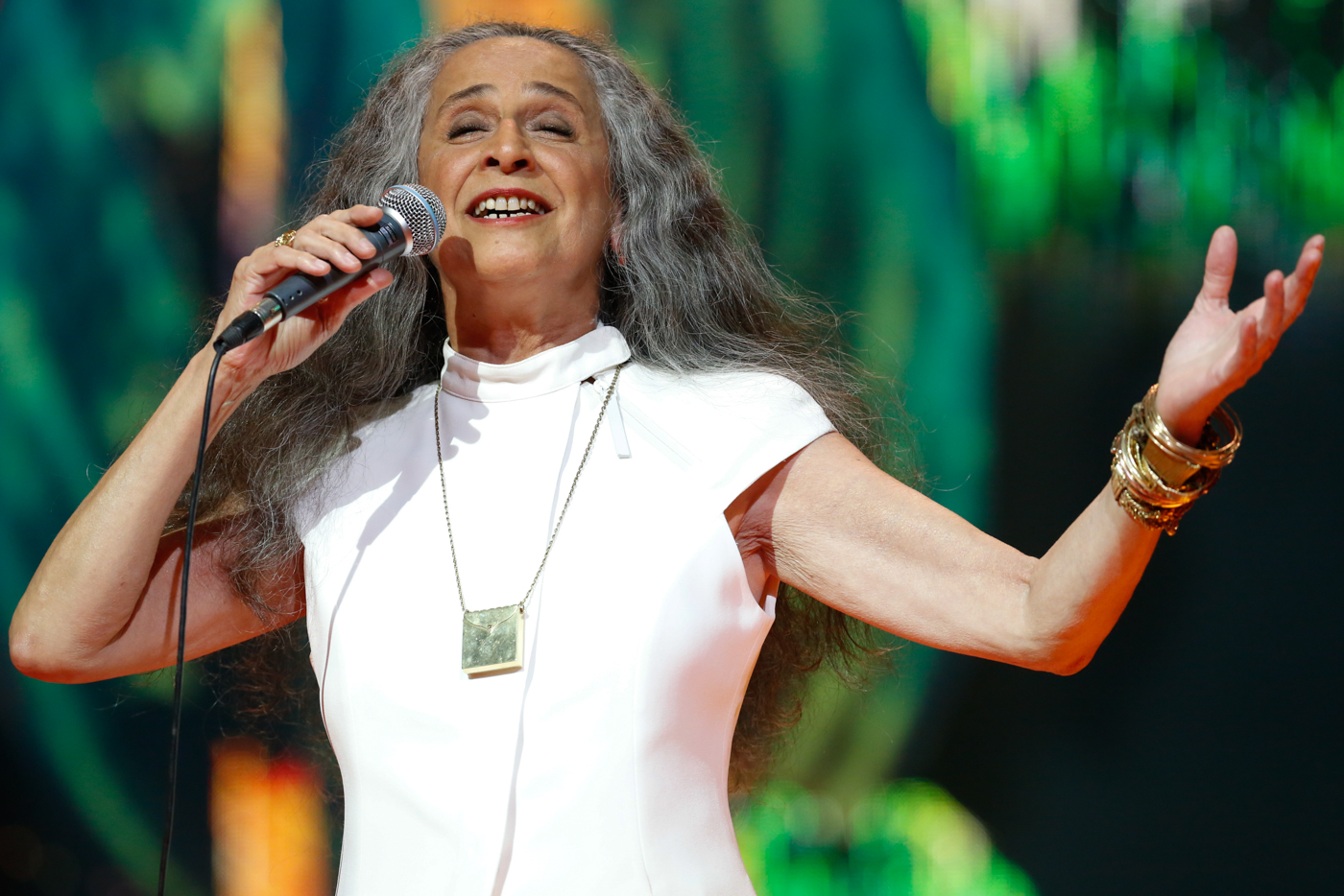 Maria Bethania durante o 25o Premio da Musica Brasileira no Theatro Municipal. Foto: Roberto Filho (14/05/14)